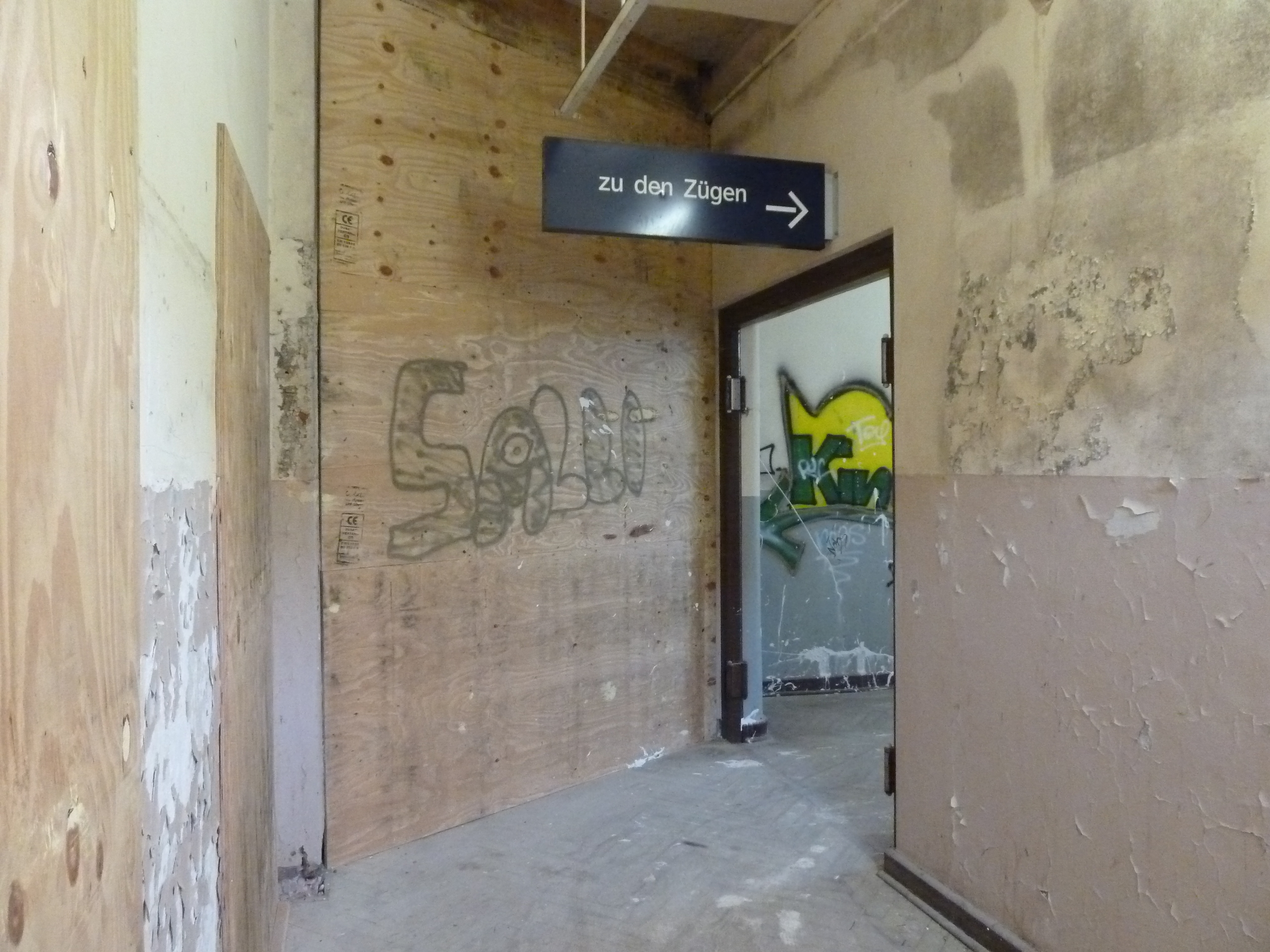 Bf. Passow, Zugang durch Gebäude zum Bahnsteig